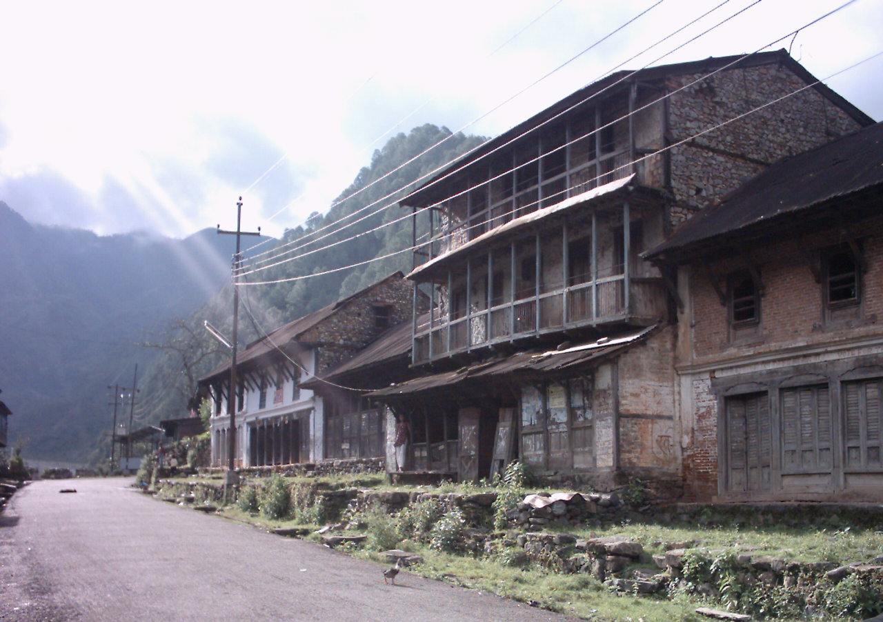 Bhimfedi Main Road